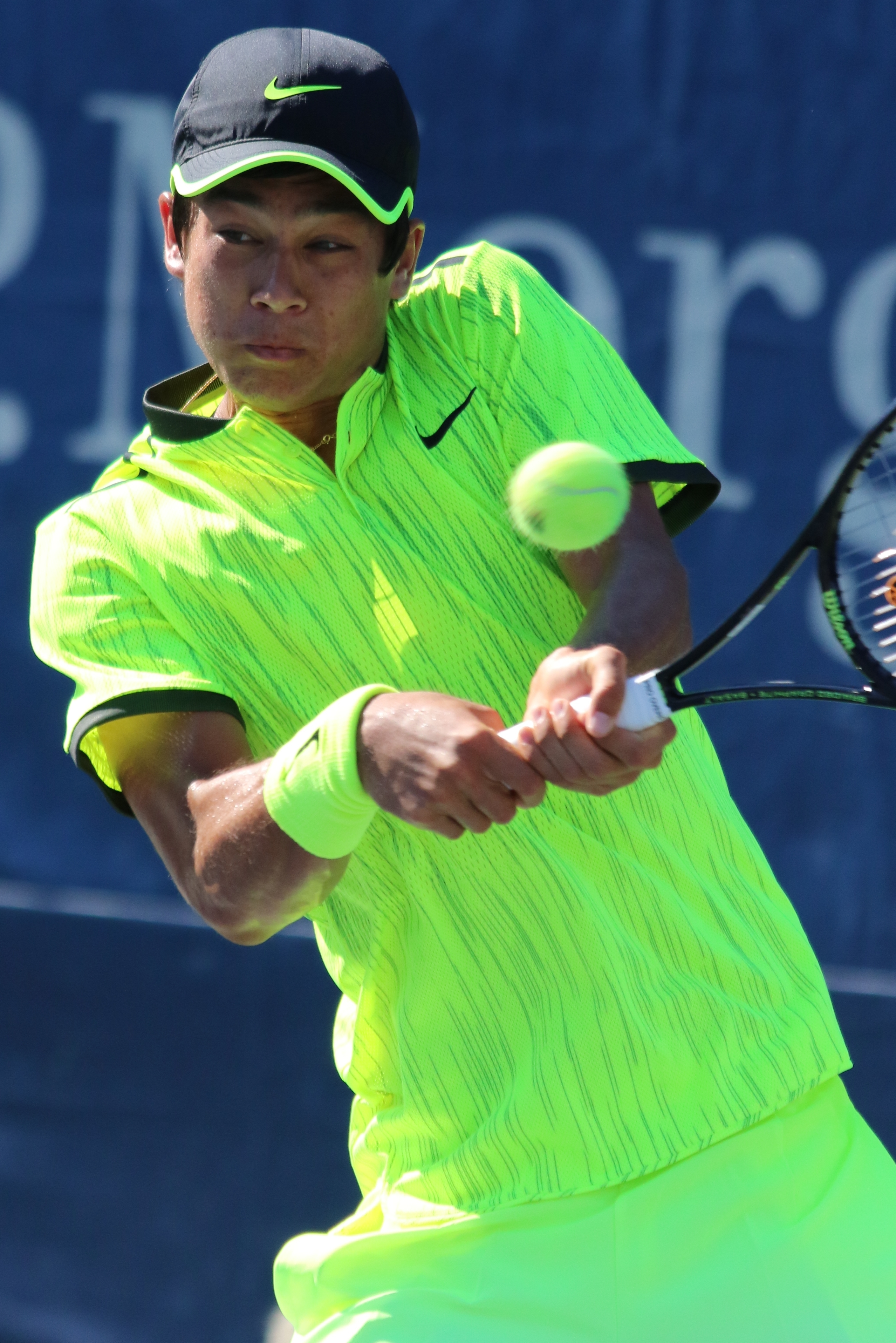 McDonald US16 (16)